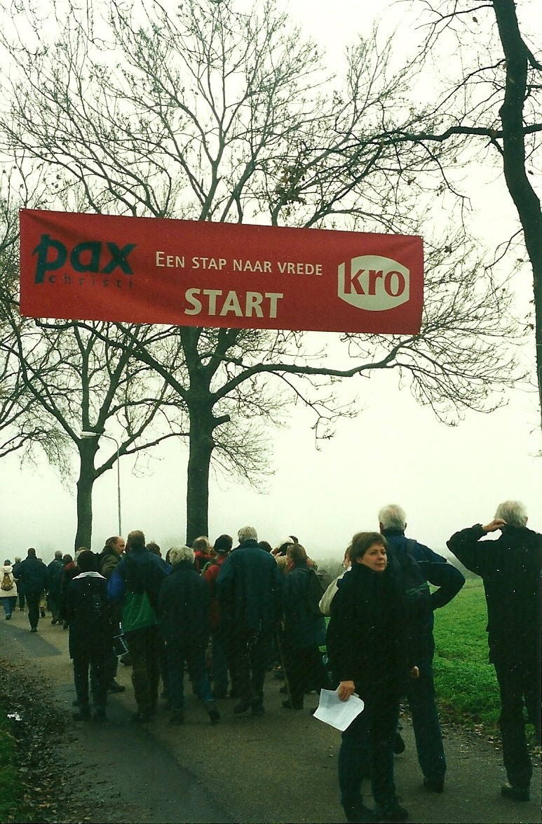 In december 2002 organiseerde Pax Christi samen met de KRO vier adventstochten in wekelijkse etappes naar Den Bosch, met duizenden deelnemers. Ze waren bedoeld als vredestochten in reactie op het klimaat van onverdraagzaamheid in Nederland na 9/11. De jaren daarna werden er opnieuw zulke tochten gehouden in Twente, Noord Holland en door Den Haag ('Tussen kerk en moskee'). De foto toont de start van de tocht in 2002.